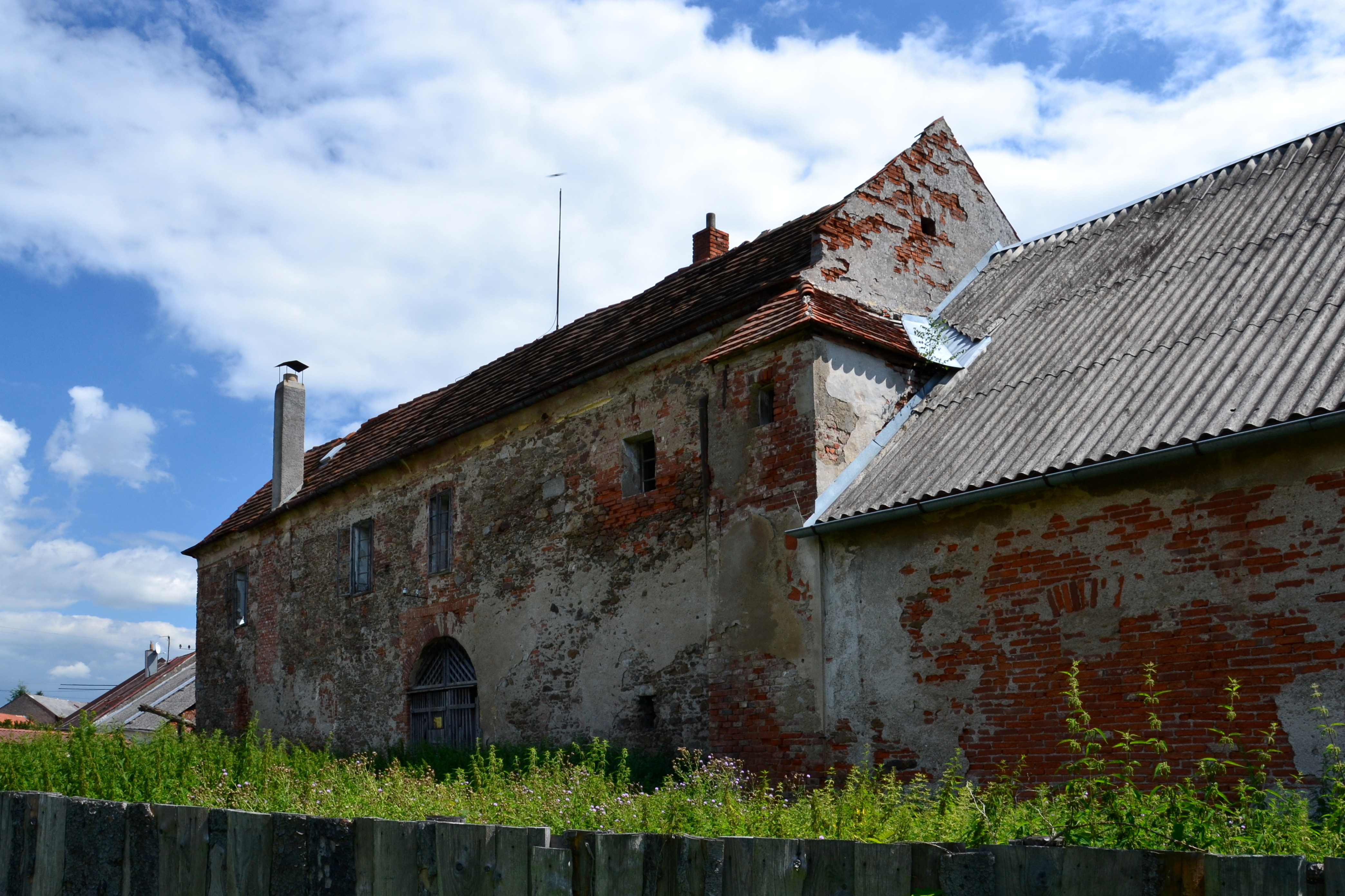 Vstupní brána do předhradí